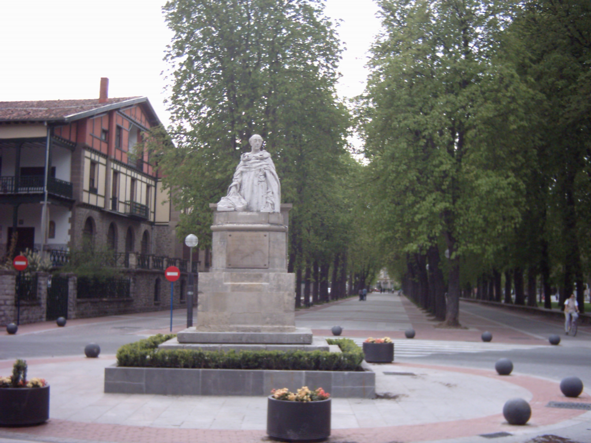 Estatua de Francisco de Vitoria, Vitoria, España